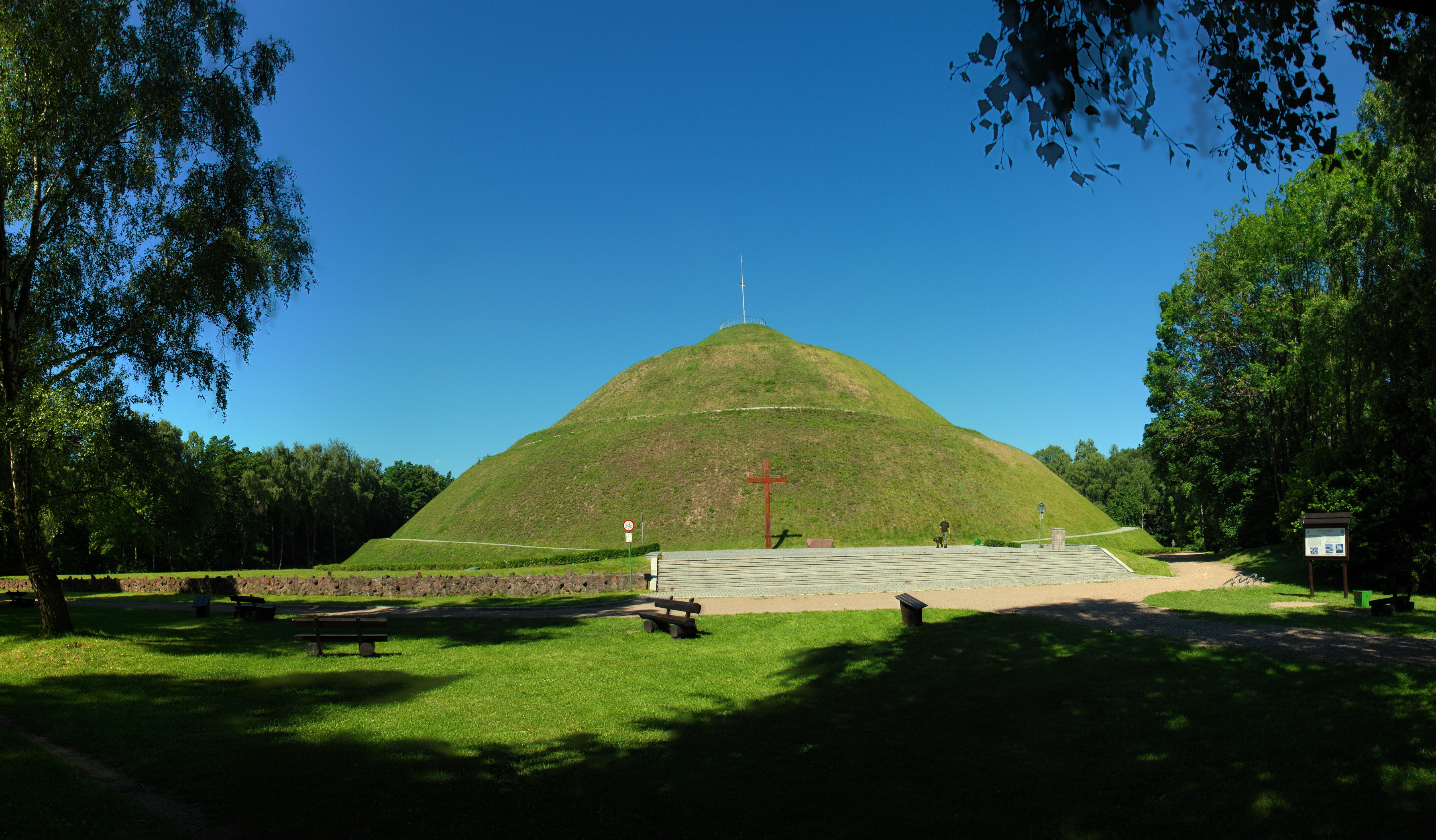 Kopiec Józefa Piłsudskiego